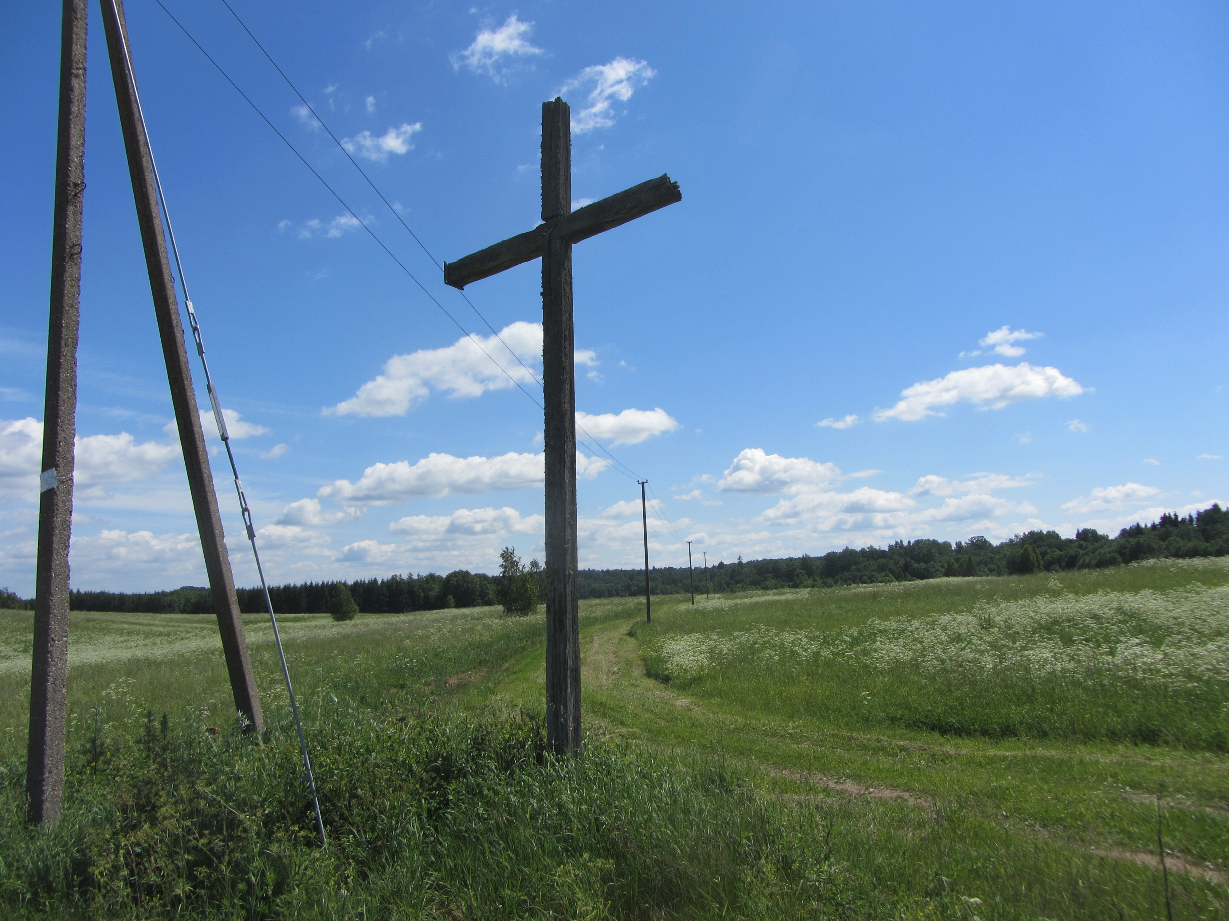 Suvieko sen., Lithuania